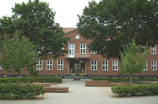 Husum Danske Skole i Husum, Nordfrisland/Sydslesvig